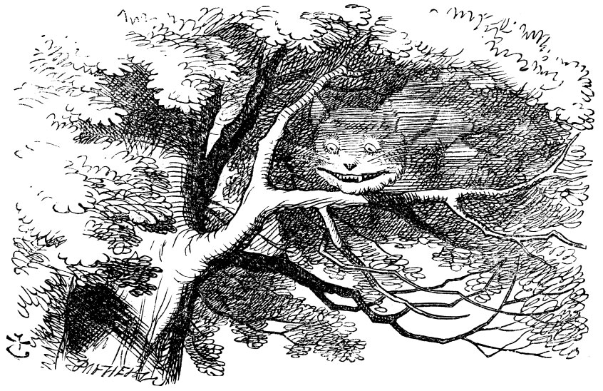 ilustração da 93ª página d’Aventuras d’Alice no País das Maravilhas